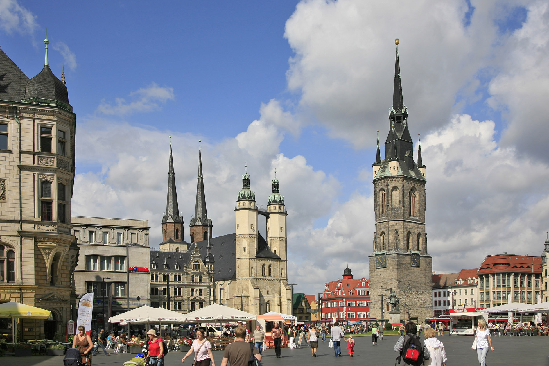 Der Marktplatz der Stadt Halle (Saale) mit der Marktkirche und dem Roten Turm